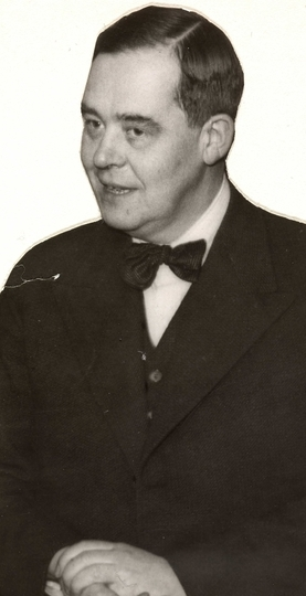 portrett, mann, skuespiller, brystbilde.